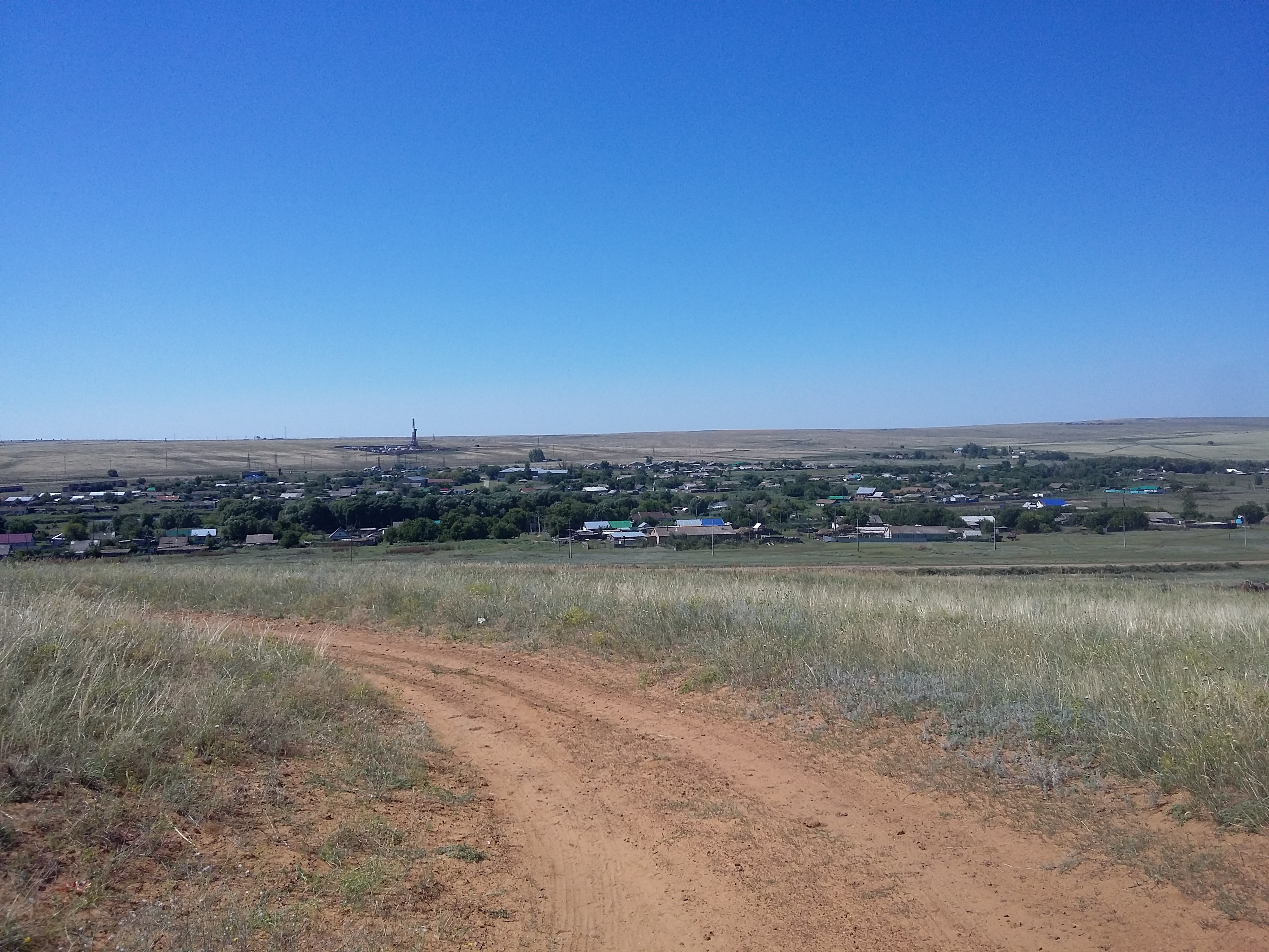 Общий вид поселка Ленинский с горы Шихан